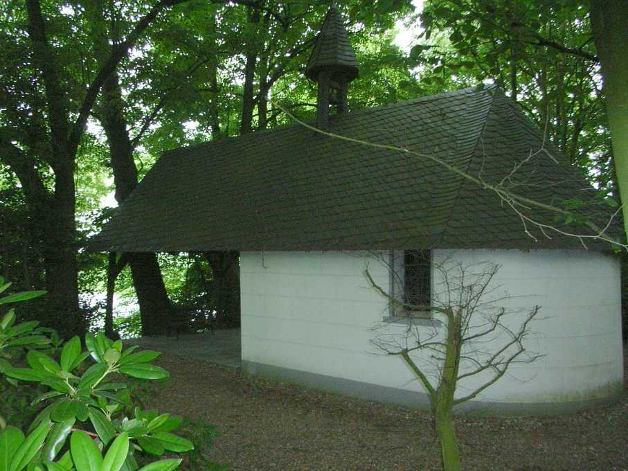 Irmunduskappelle, Hahnerhof bei Titz-Mündt